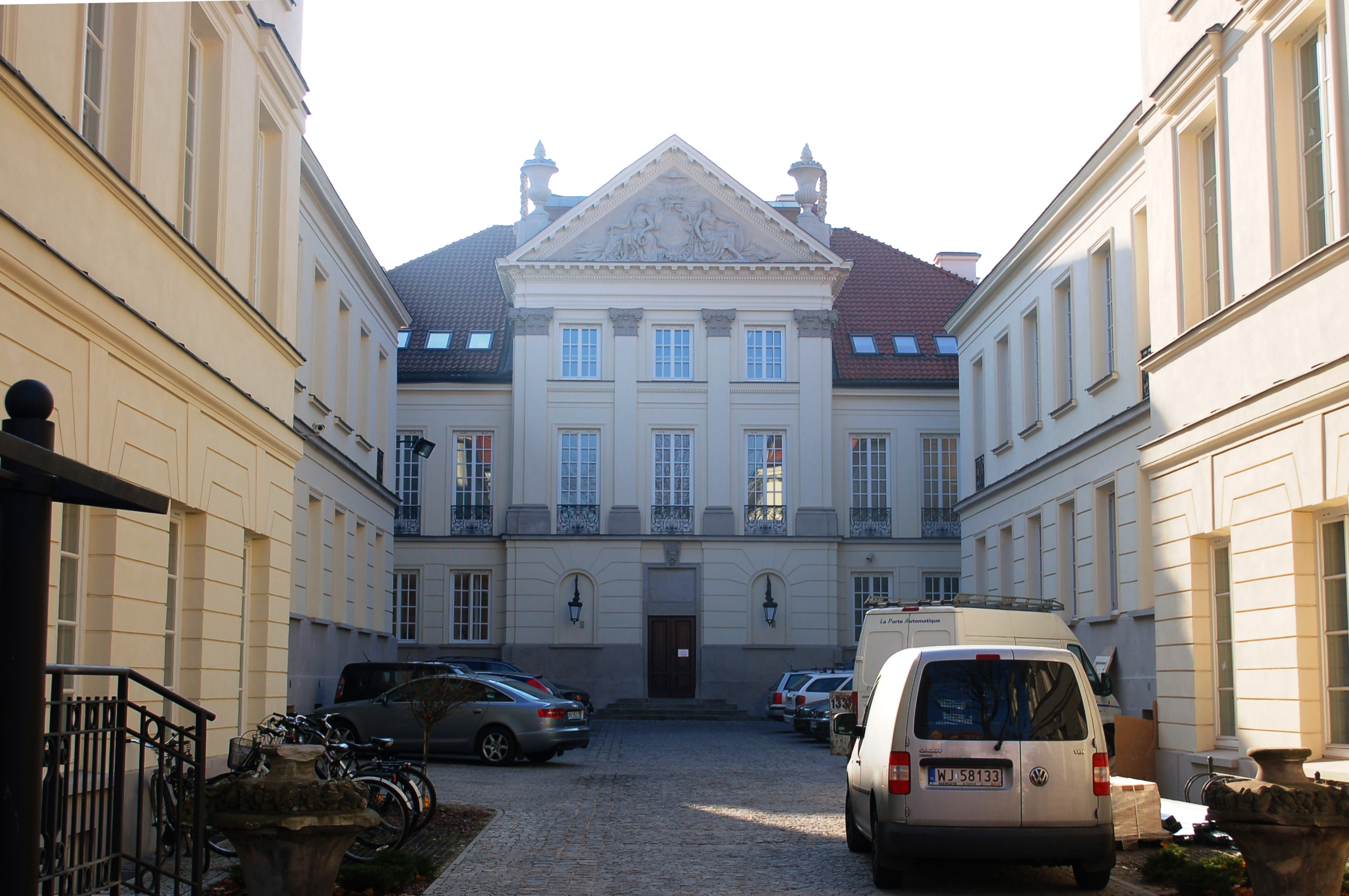 Warschau, Miodowa-Strasse